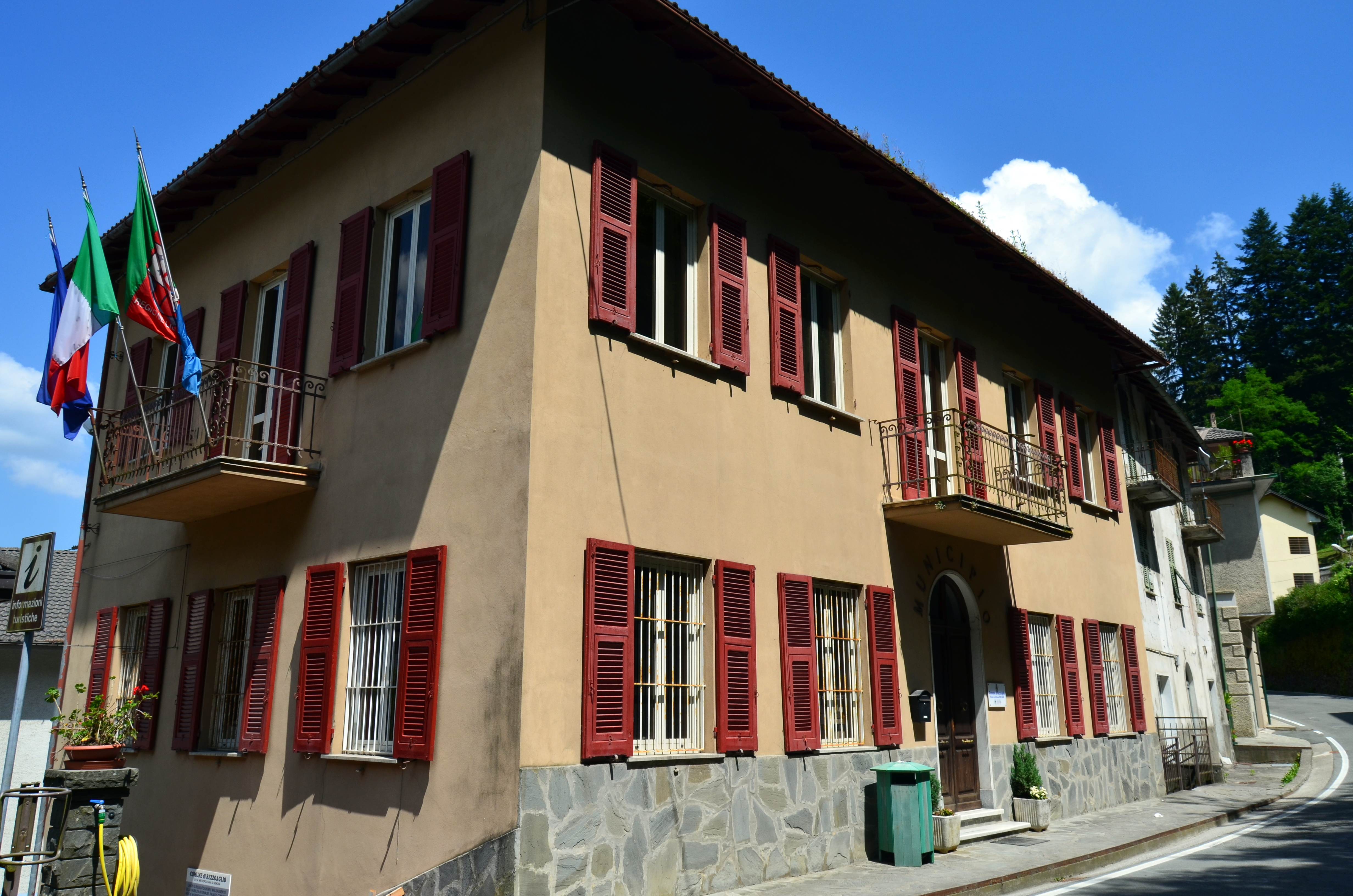 Municipio di Rezzoaglio, Liguria, Italia